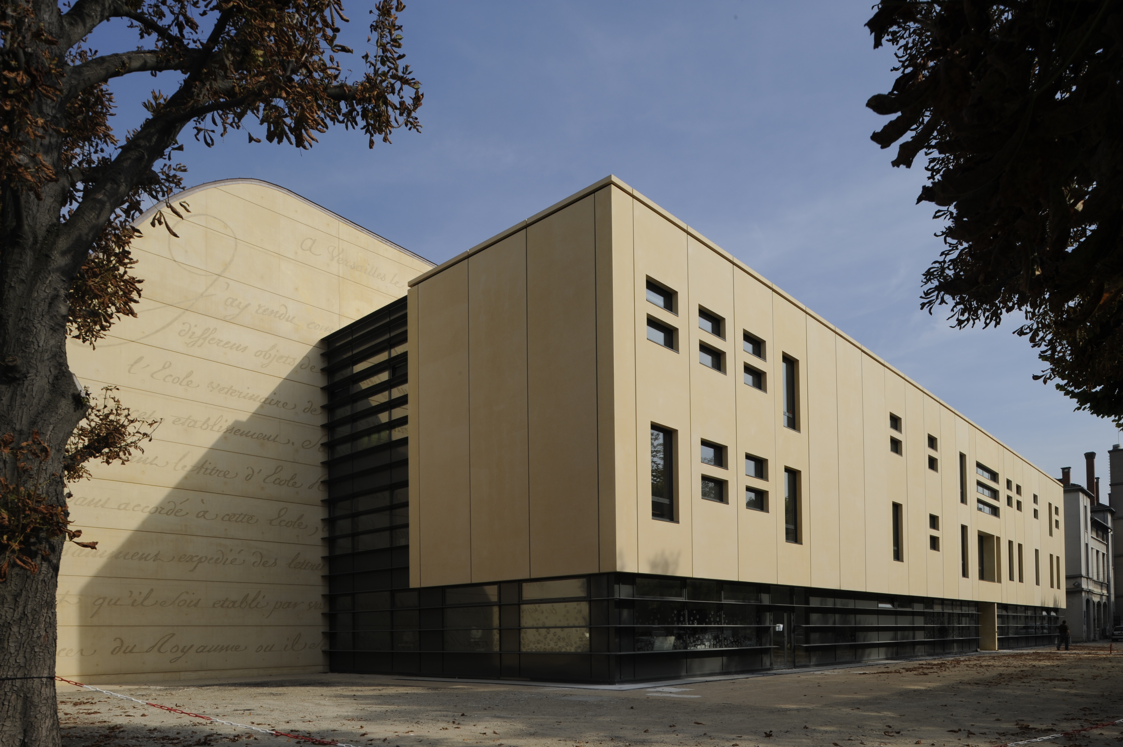 Le Centre Hospitalier Universitaire Vétérinaire d'Alfort en 2009, peu après sa mise en fonction.